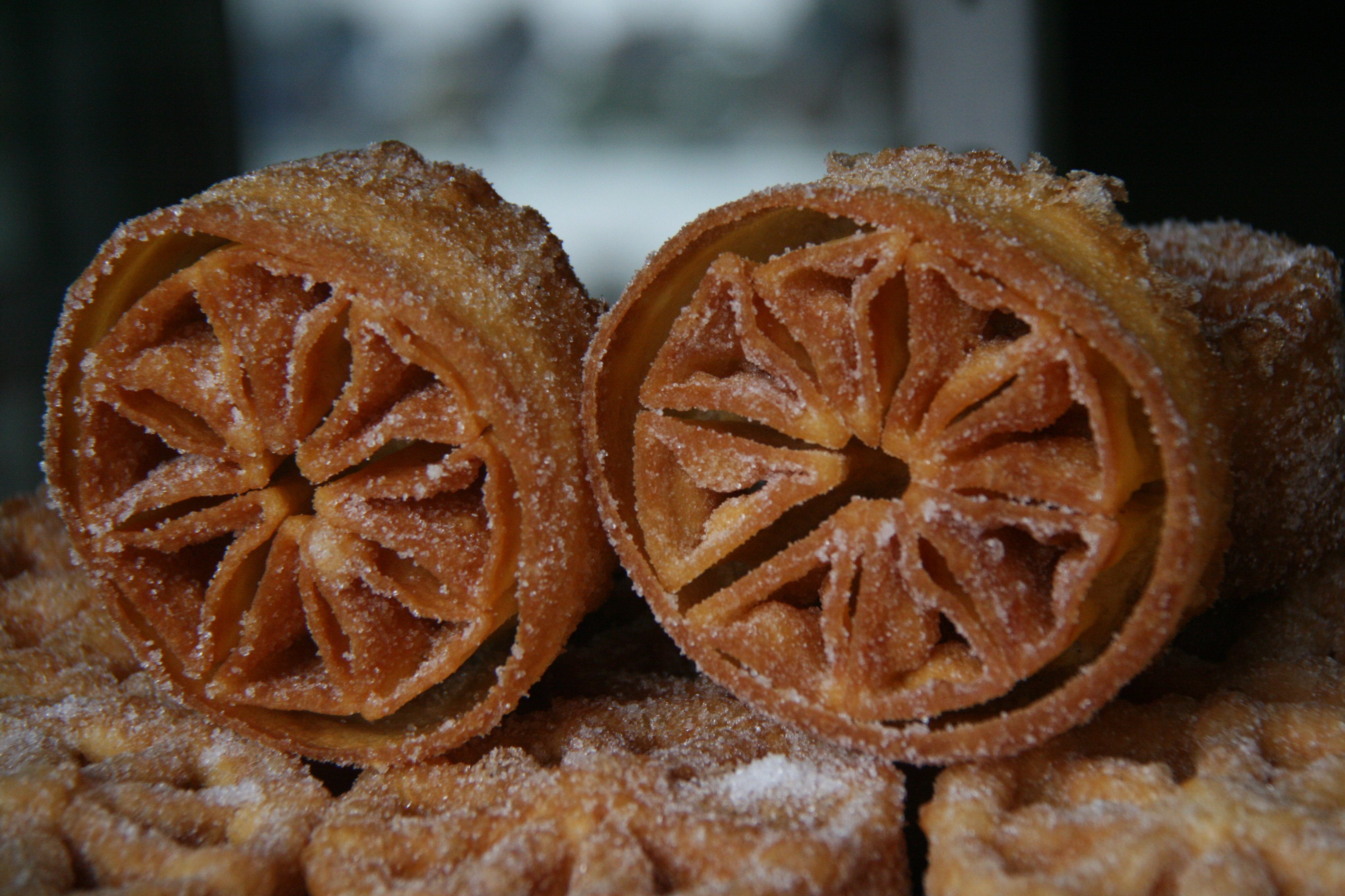 Flores fritas de Salamanca (Frutas de sartén)